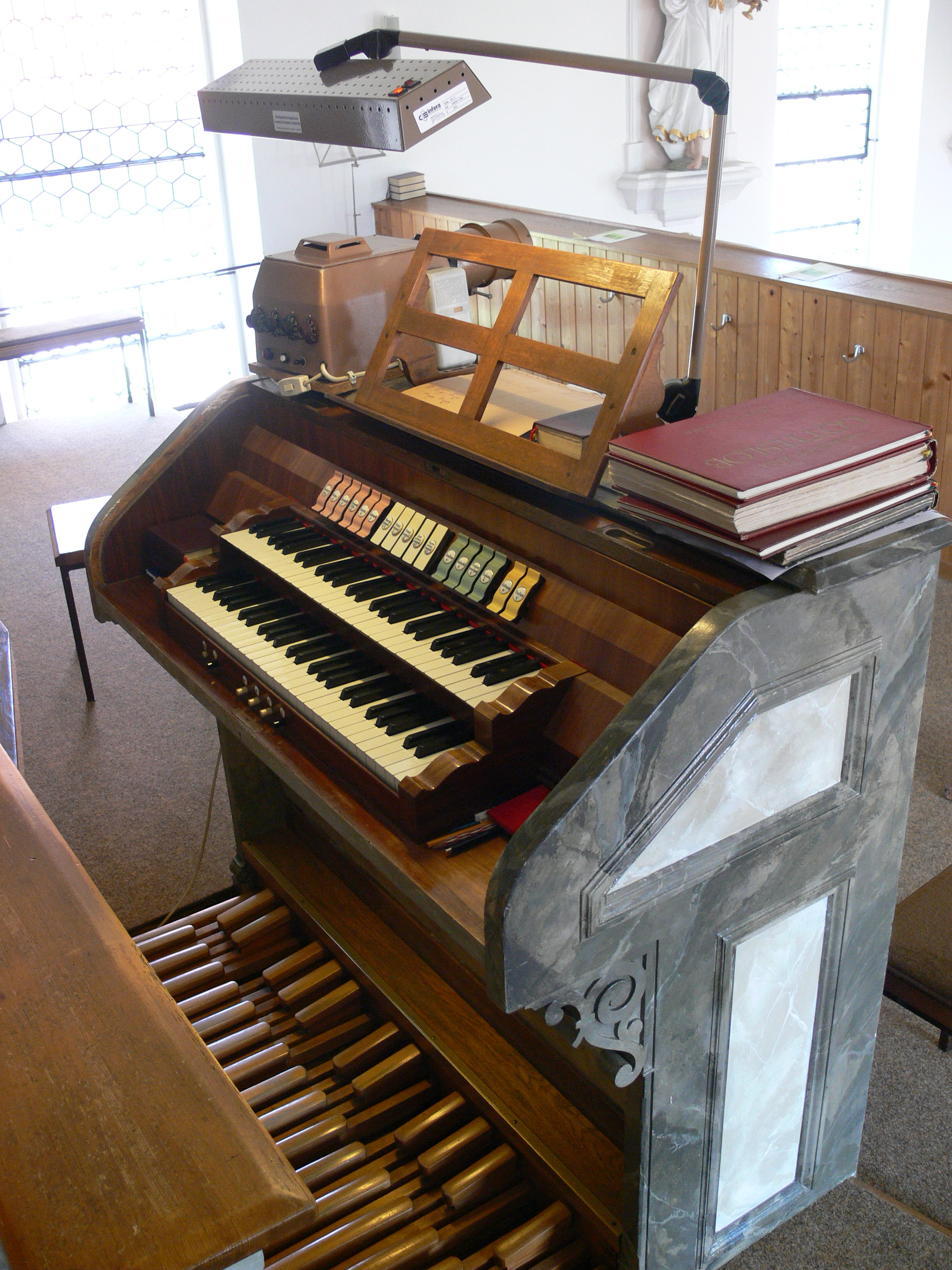 Hergensweiler, Landkreis Lindau Pfarrkirche St. Ambrosius, Orgel, Spieltisch der Orgel der Gebr. Hindelang (Ebenhofen) op. 212 von 1906 (II/P, 12 Register)